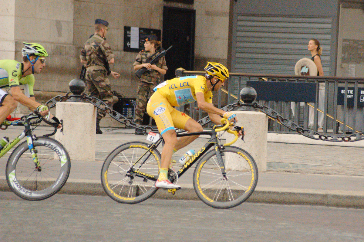 21è étape du Tour de France 2014, Evry-Paris Champs Elysées, photo prise à Paris au pied de l'Arc de Triomphe.